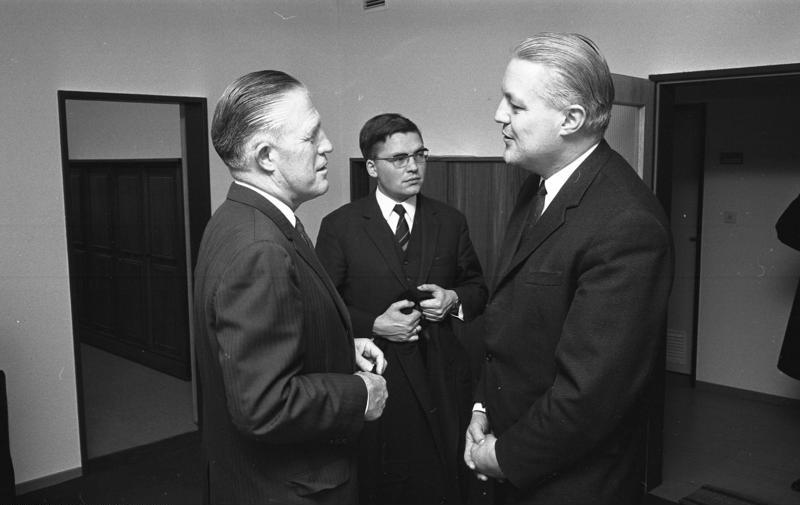 BM Stoltenberg empfängt den US Gouverneur, Romney [republikanischer Präsidentschaftskandidat]